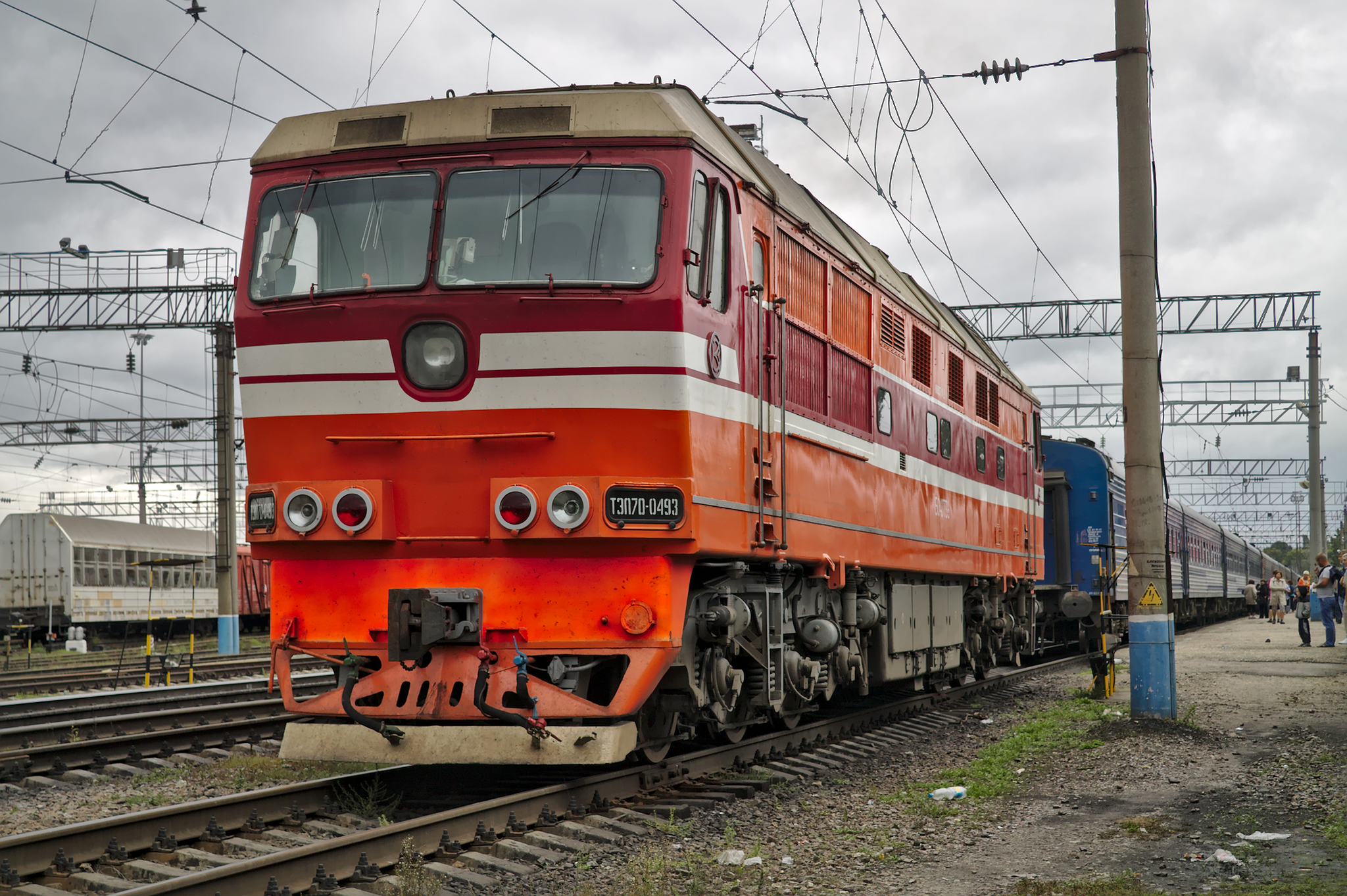 ТЭП70-0493 заходит под пассажирский поезд Адлер - Санкт-Петербург, Елец. см. фото 542297 в альбоме автора